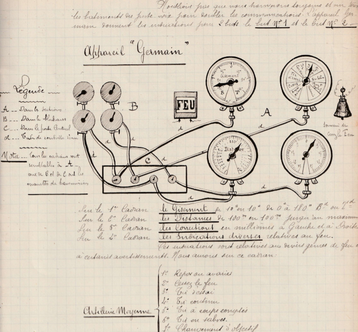 Une page d'un cahier, Armand Hayet était âgé de 15 ans